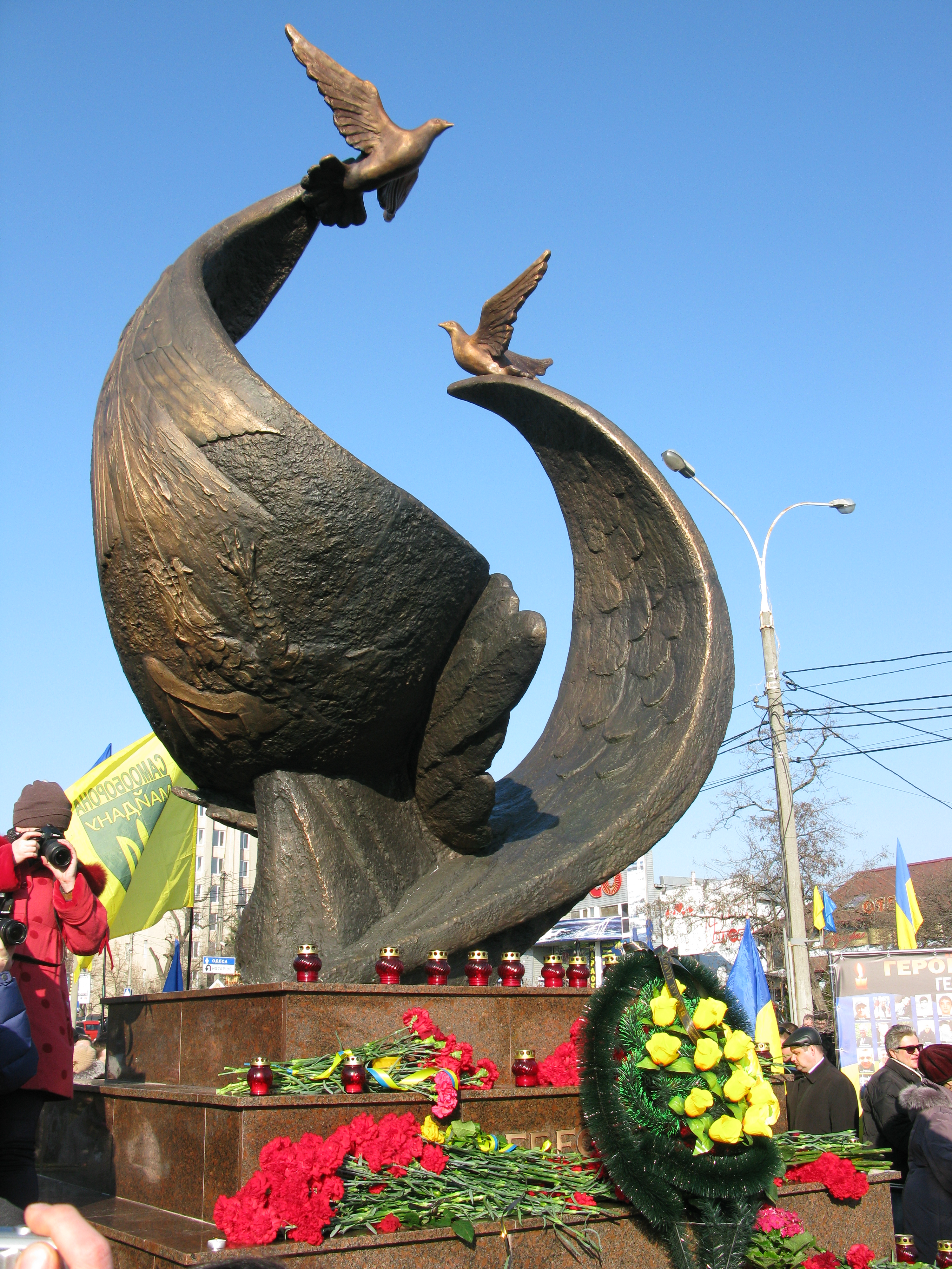 Пам’ятник Небесній Сотні місто Миколаїв. 2015 р.